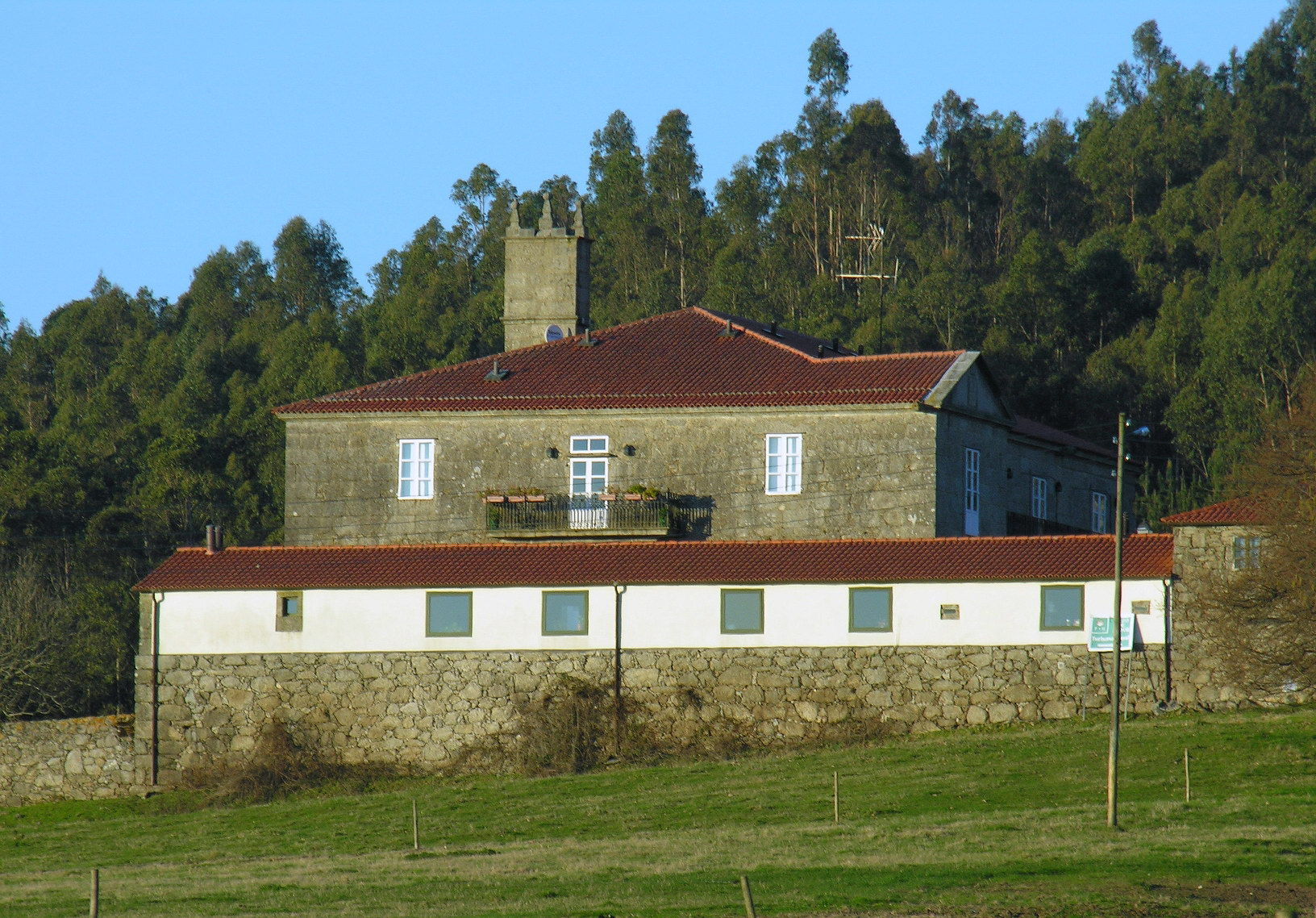 A Castañeda, Concello de Arzúa, Galiza